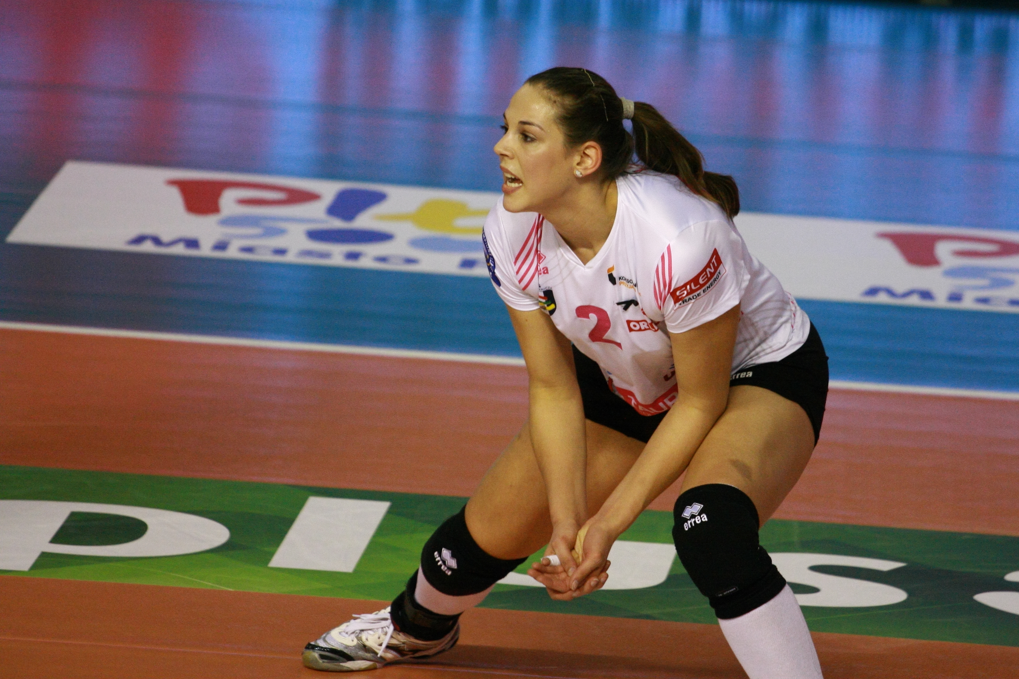 Atom Trefl Sopot Bank BPS Muszynianka Fakro Muszyna Tauron MKS Dąbrowa Górnicza Impel Gwardia Wrocław